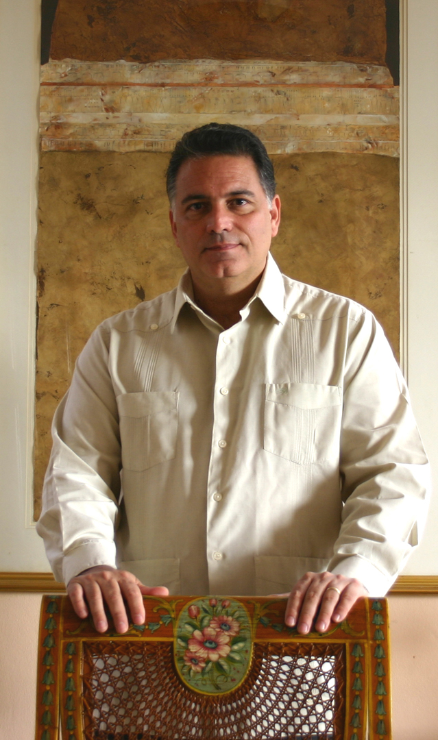 imagen fuente para arte ASCII. Angel Luis Arambilet Álvarez (Arambilet) (Santo Domingo, República Dominicana, 16 de septiembre de 1957). Escritor, artista plástico, humorista gráfico, videógrafo e ingeniero de sistemas.